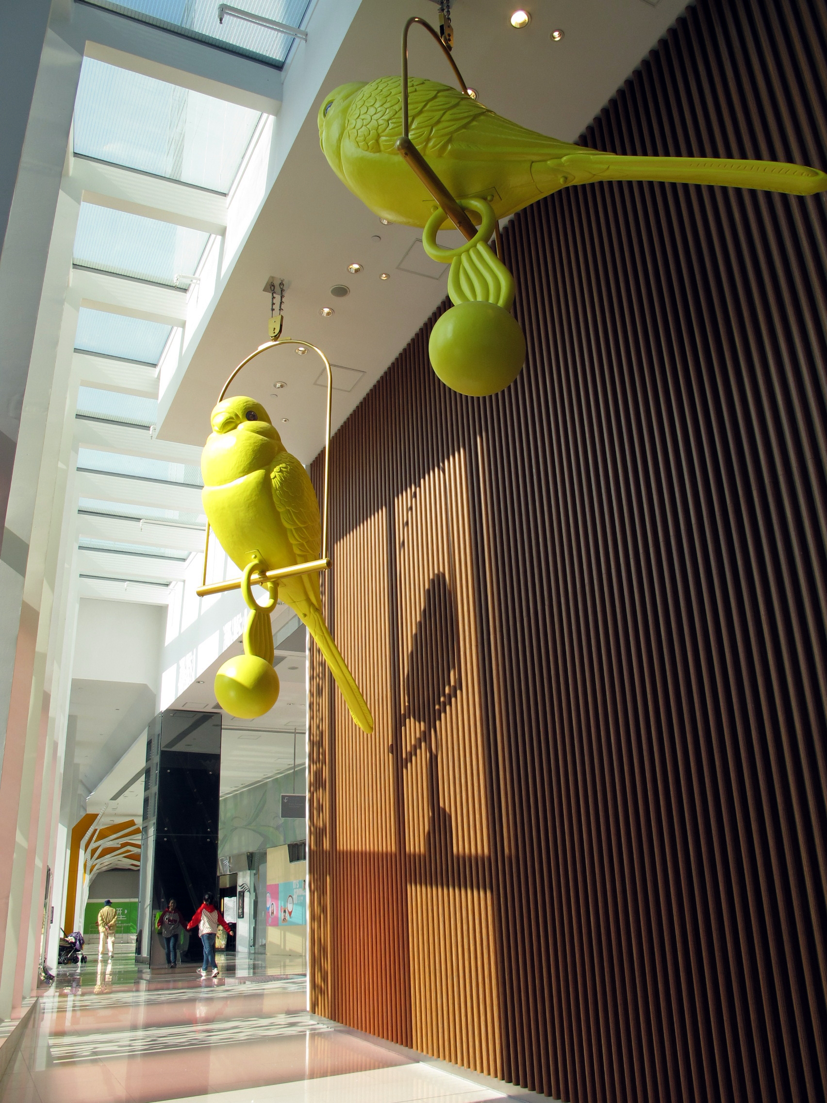 Domain Mall LG2 Sculpture